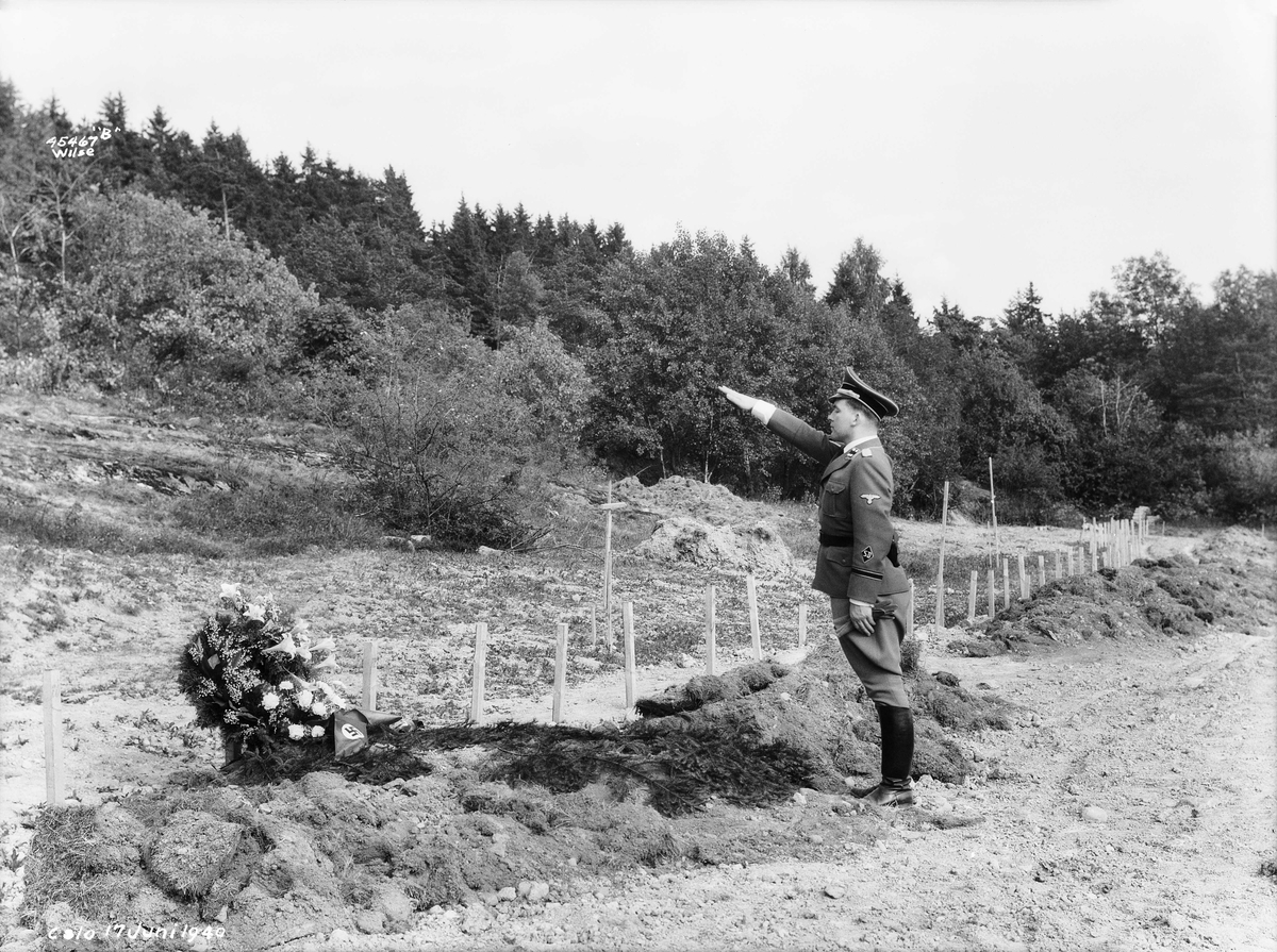 tysk krigskirkegård, grav, krans, hakekors, offiser, hilsen